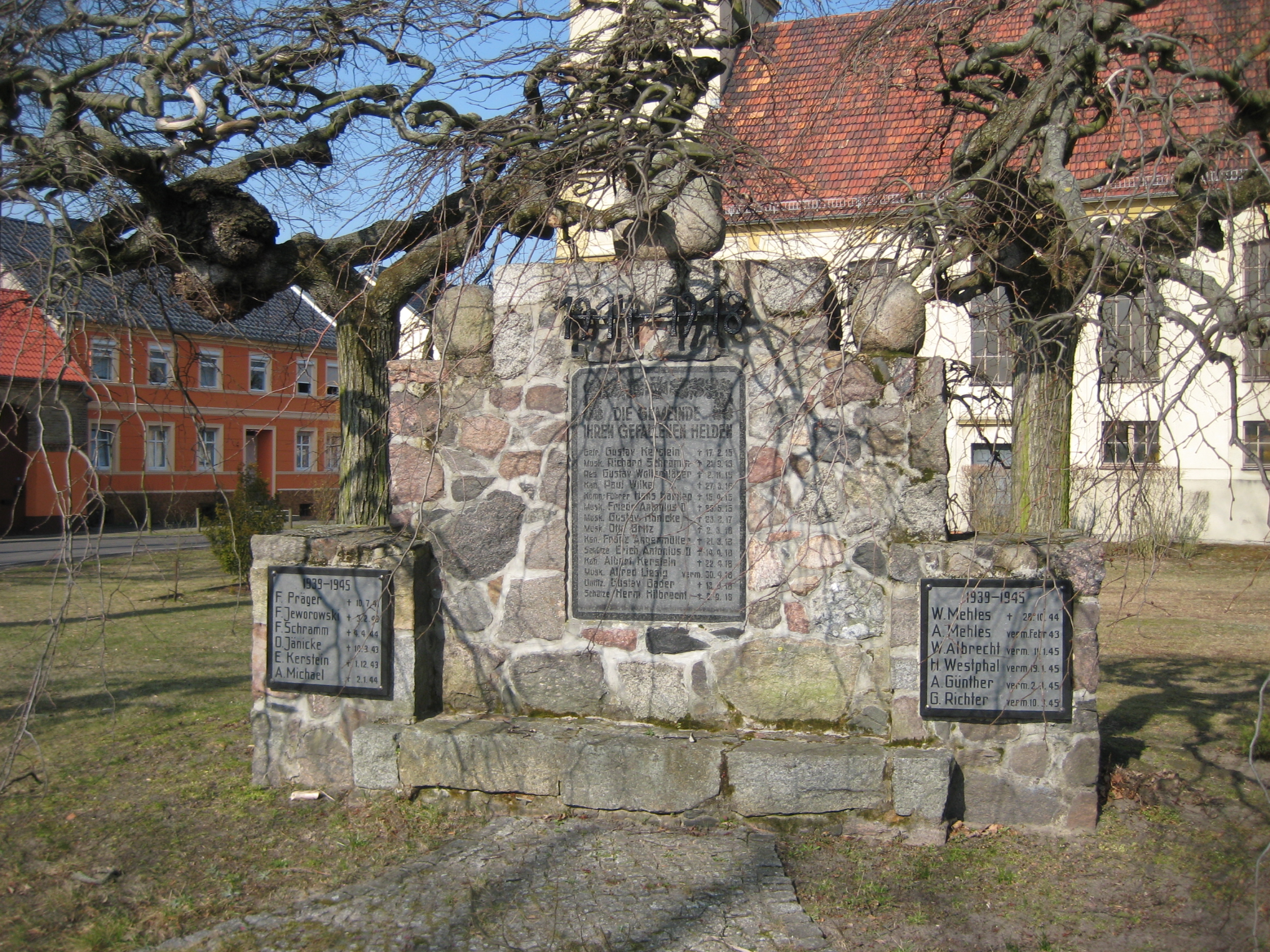 Denkmal Weltkriege - Schöneweide